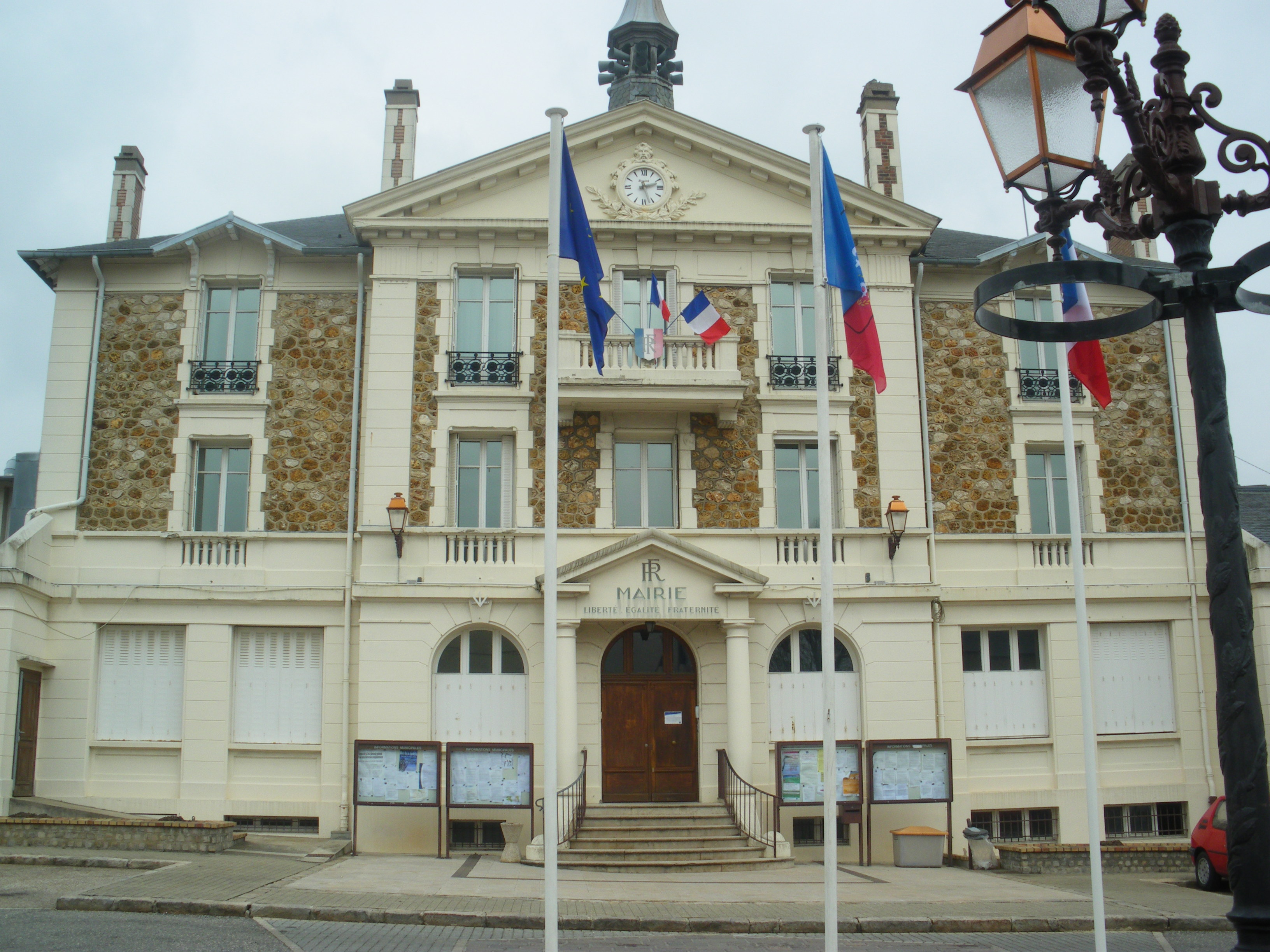 Mairie Wissous, Essonne, France